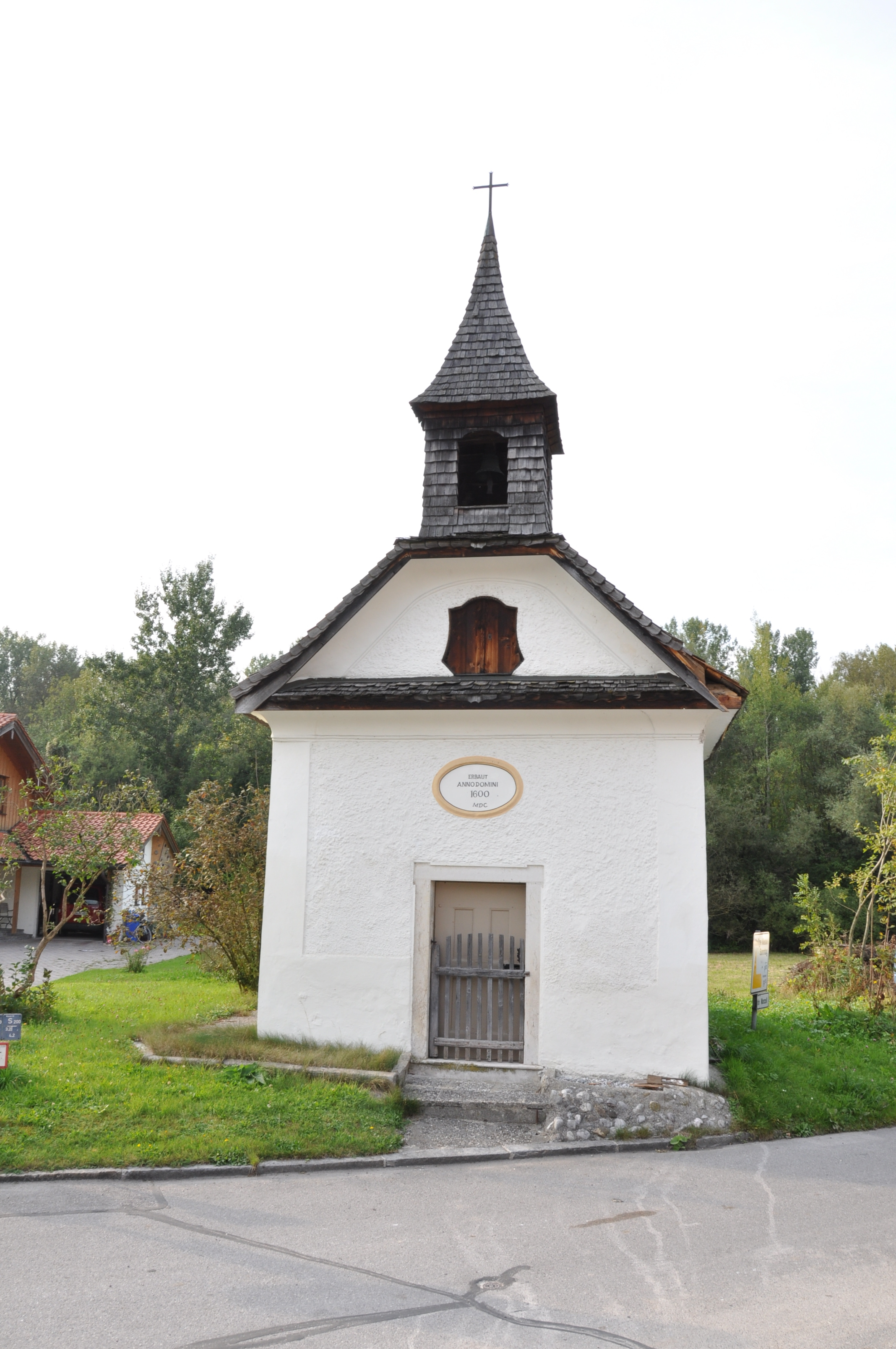 Kapelle im Bad Reichenhaller Ortsteil Schwarzbach. Gehört zum ehemaligen Gasthof Roider gegenüber der Straße. Erbaut 1600. Aktennummer: D-1-72-114-219